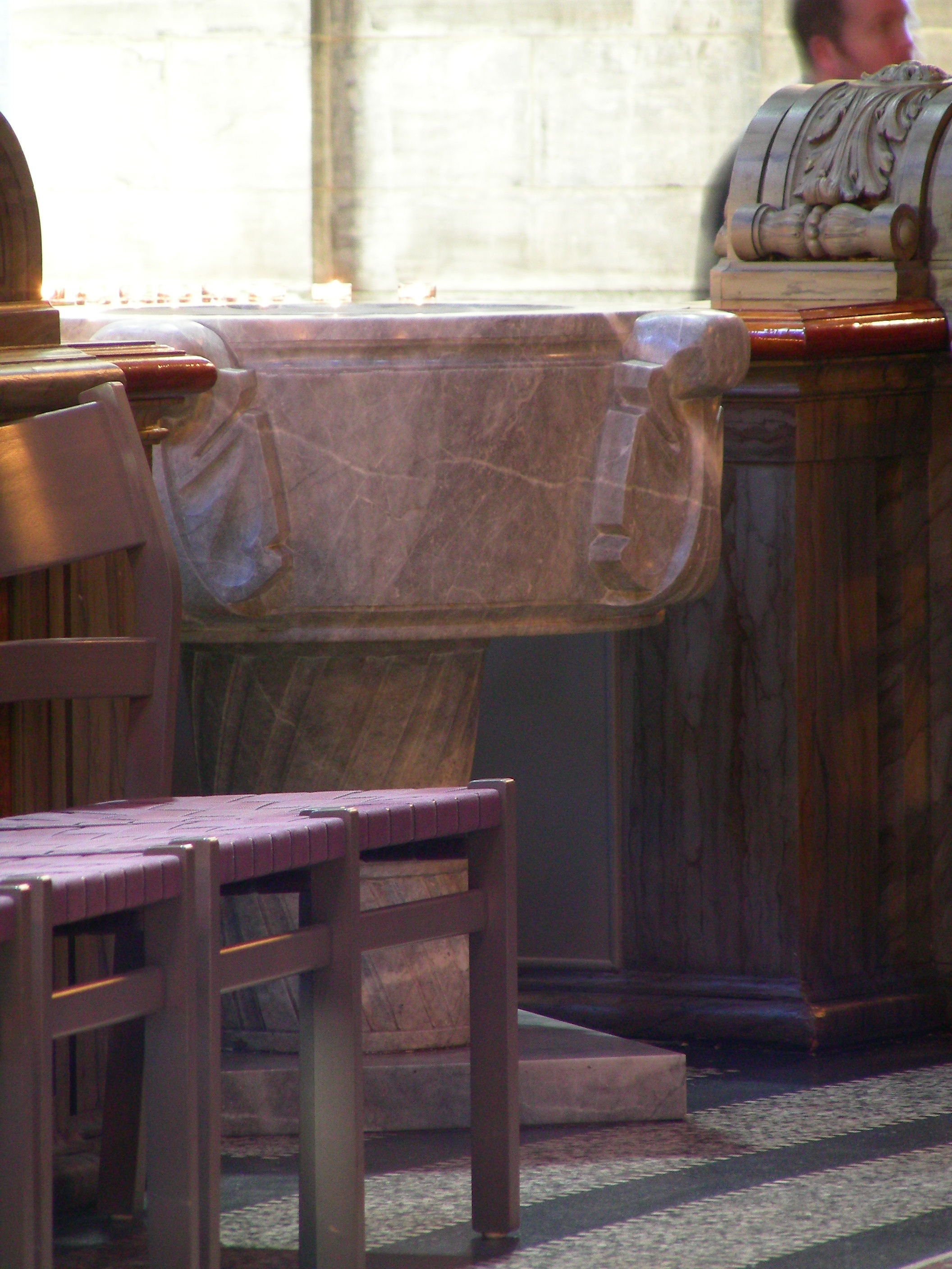 Marmorkirken, Copenhagen, Denmark. Baptismal font.